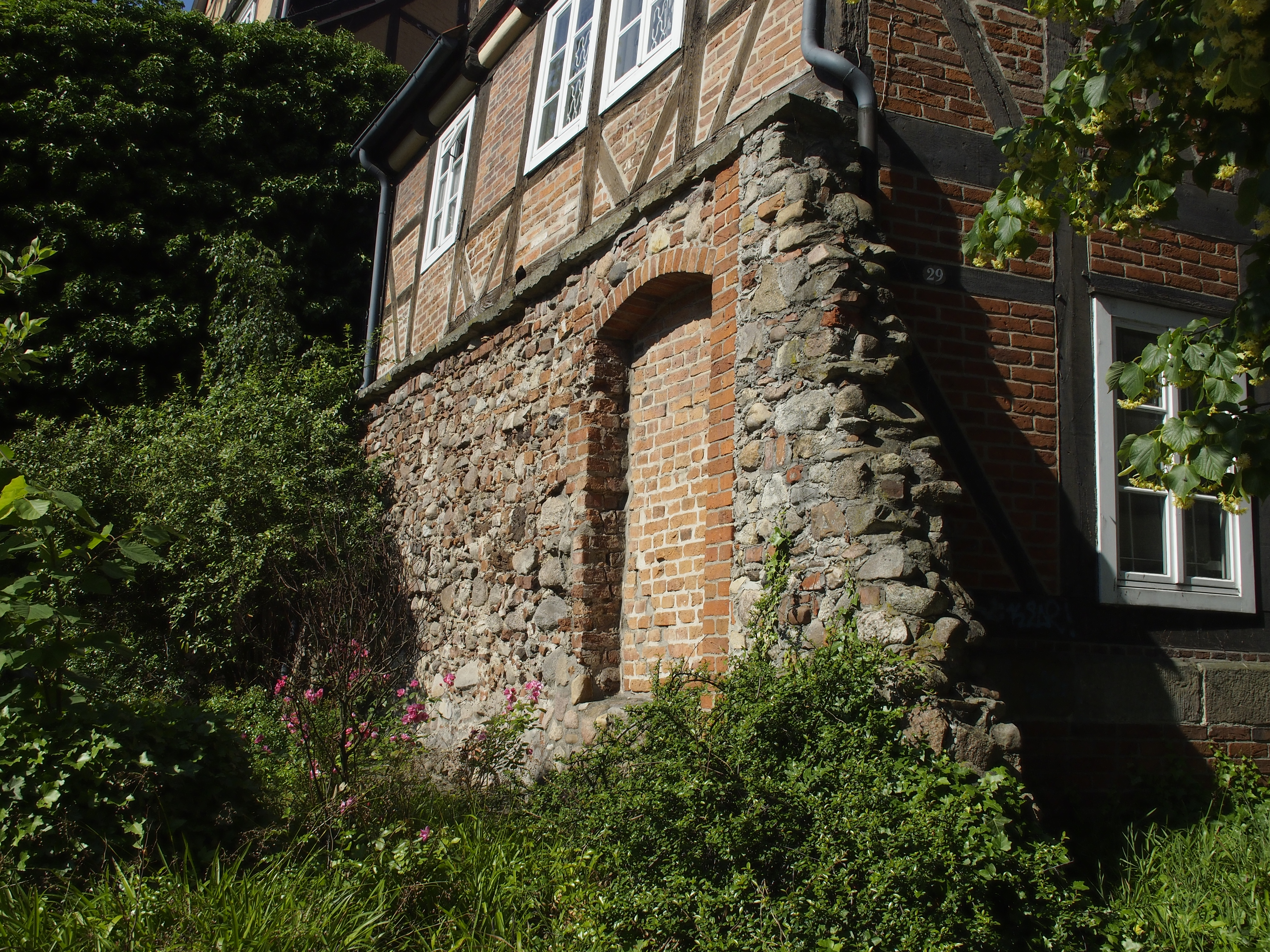 Reste der Celler Stadtmauer von 1530